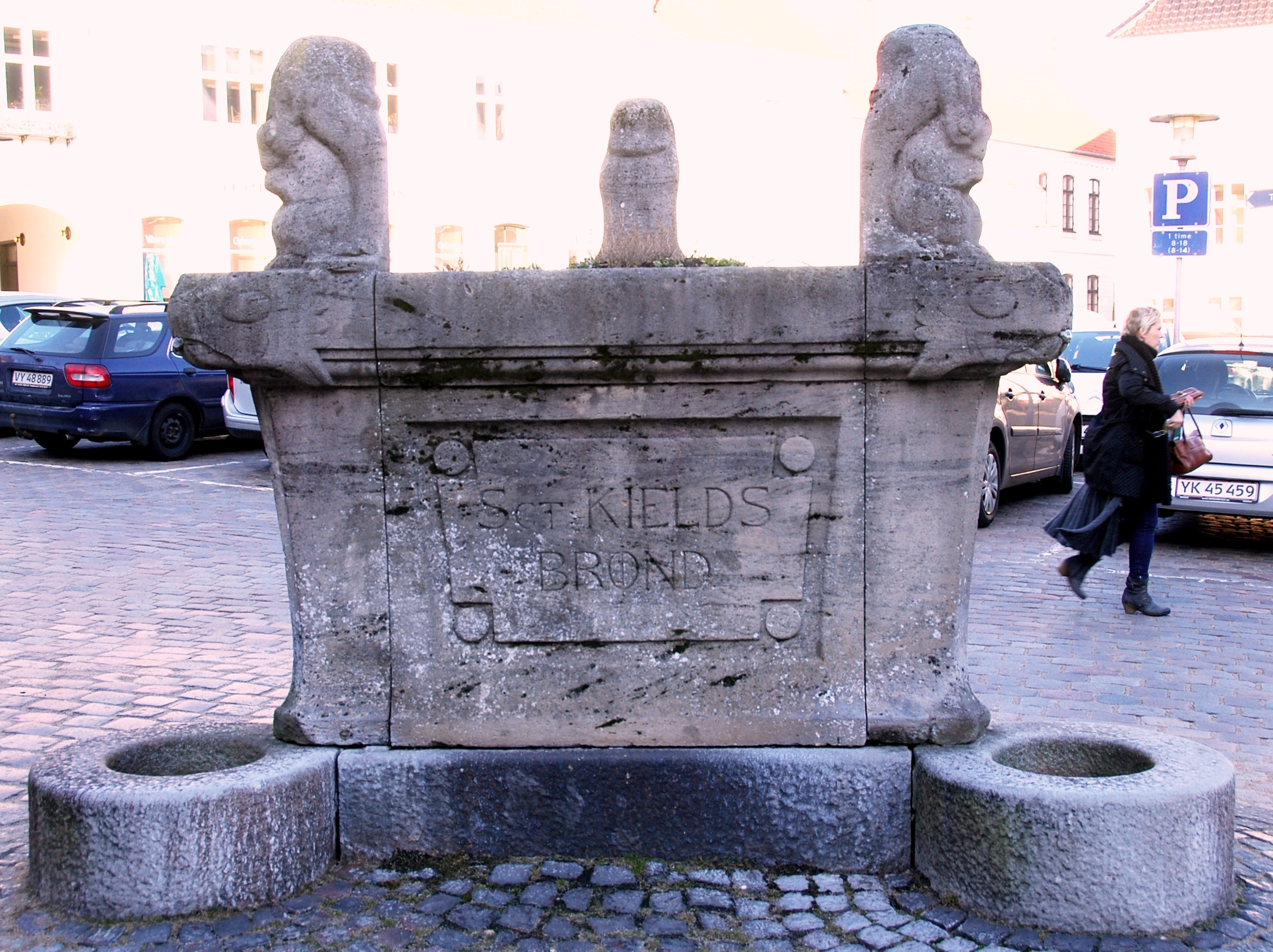 Sct. Kjelds Brønd, placeret på Nytorv i Viborg.